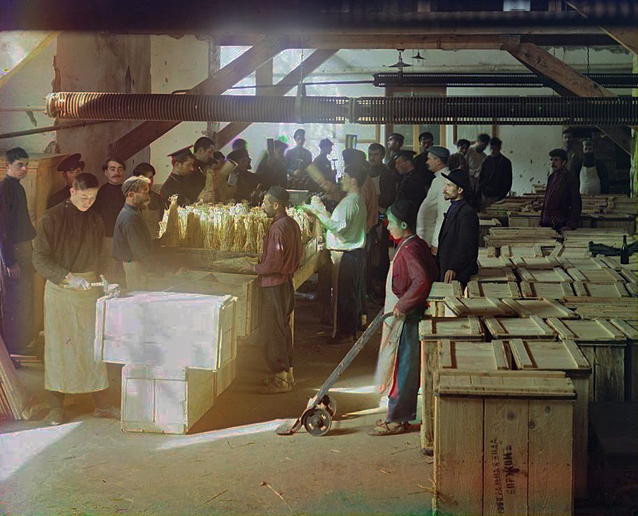 Packaging department. Borzhom.